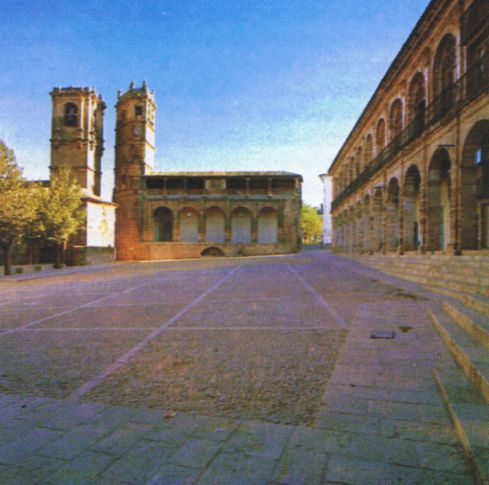 Plaza de Alcaraz (Albacete-España)